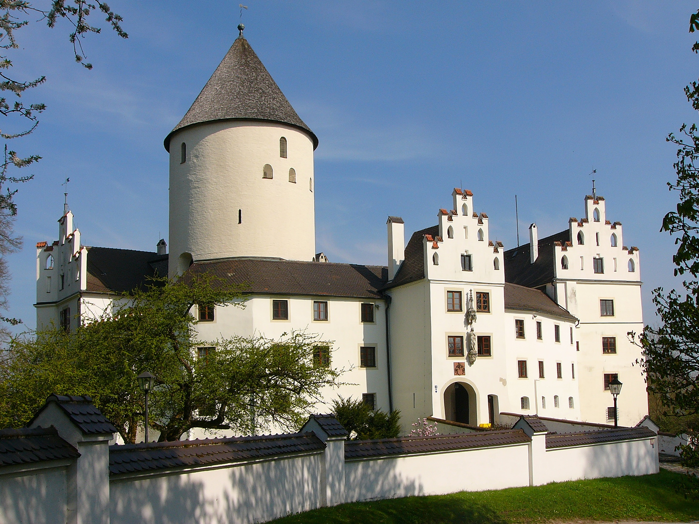 Schloss; vierflügelanlage mit romanischem Bergfried, 12./13. Jahrhundert und gotischer Ringmauer, Wohntrakte aus dem 16./17. Jahrhundert, der nordöstlich vorgelagerte Lehenstock um 1580 errichtet, die Zinnengiebel von 1860; Schlosskapelle innerhalb des Bergfrieds von 1673; mit Ausstattung; Schlosspark im englischen Gartenstil, 19. Jahrhundert.This is a photograph of an architectural monument.